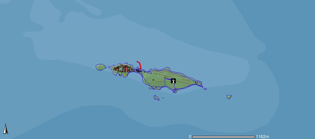 Mapa de la reserva marina de la Isla de Tabarca